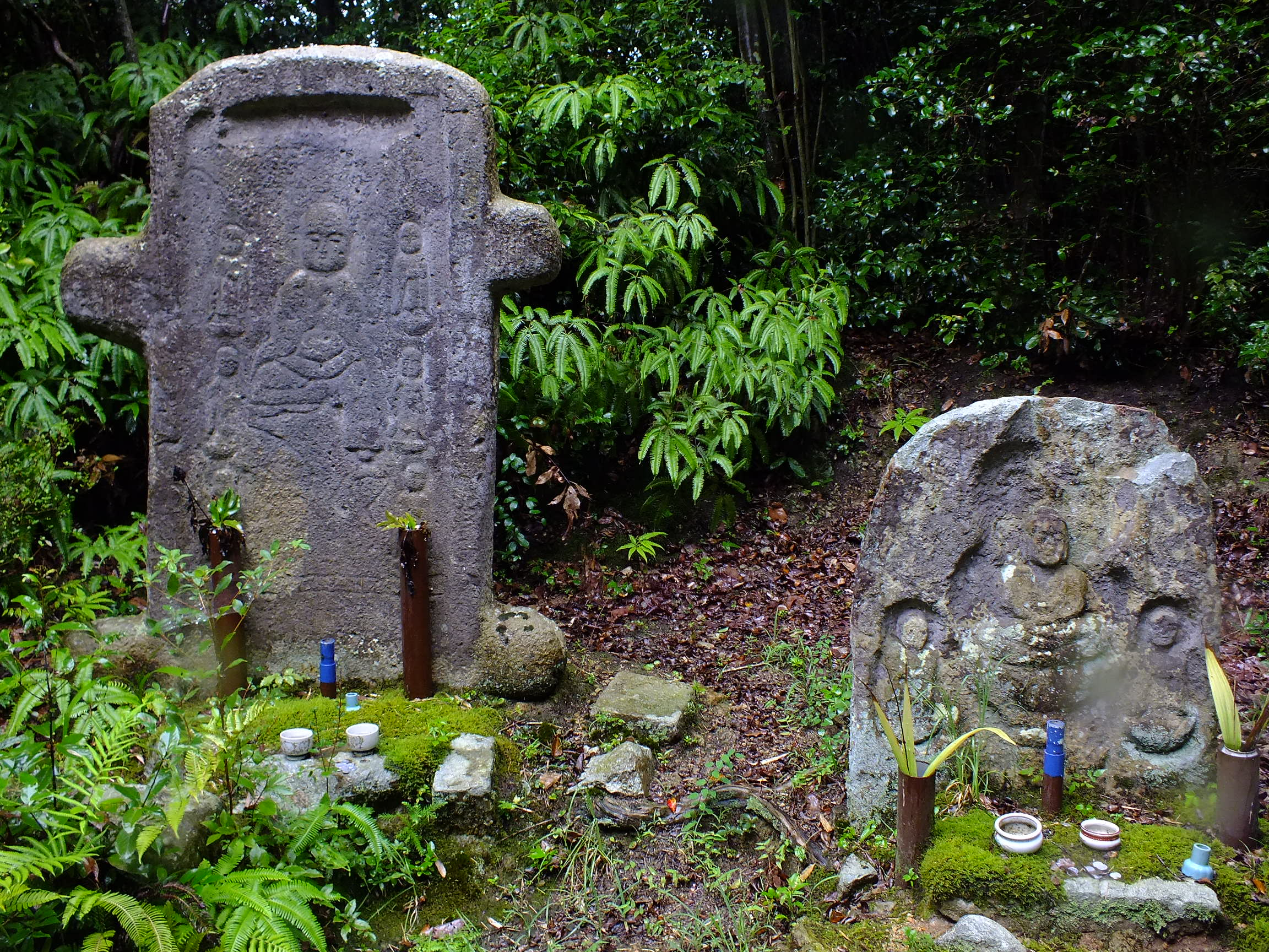 Yamabushi-Toge Sekibutsu 山伏峠石仏(兵庫県加西市玉野町)